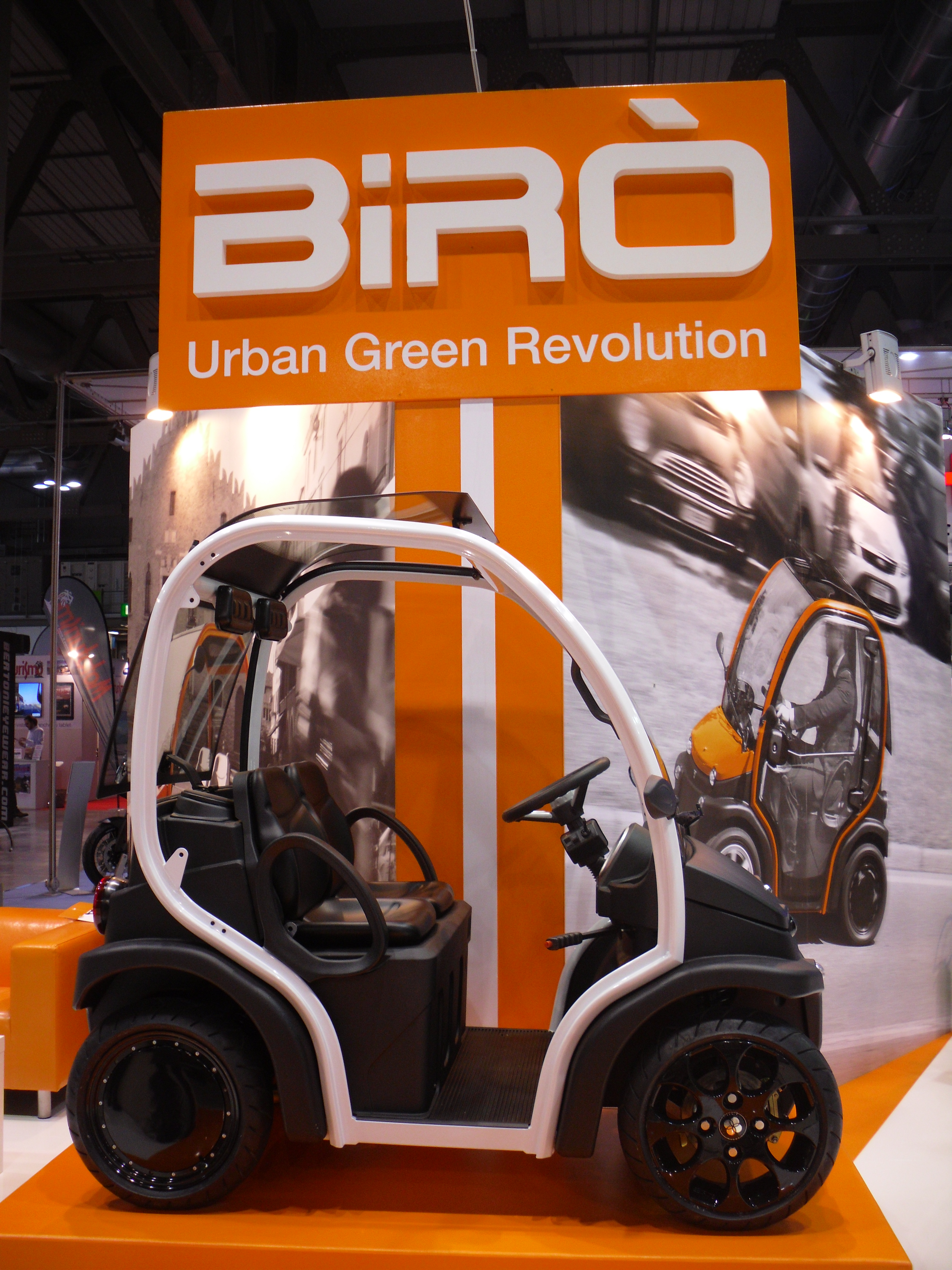 Birò, il quadriciclo elettrico leggero di Estrima